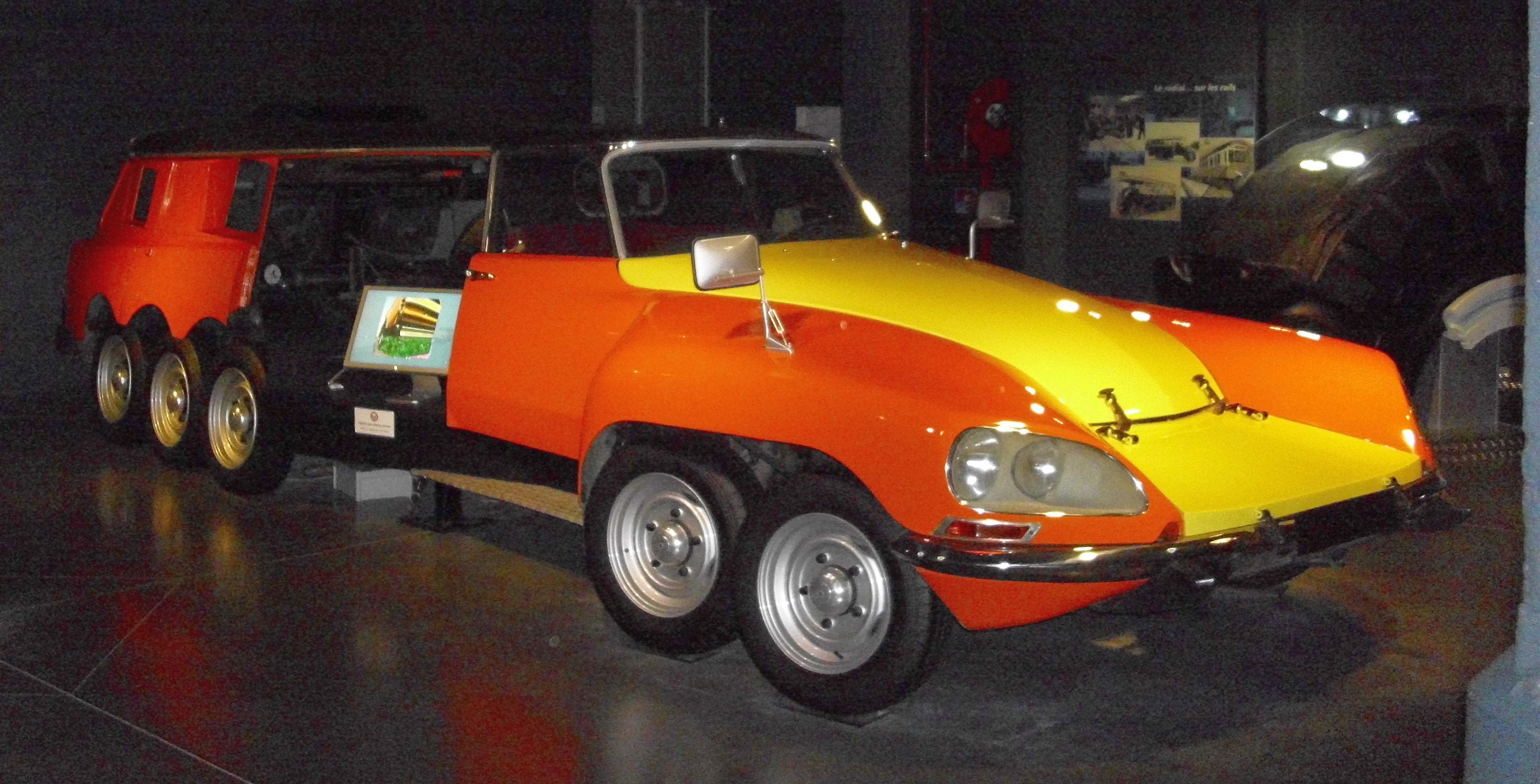 Citroën Mille Pattes von 1972 im Museum L'Aventure Michelin in Clermont-Ferrand.